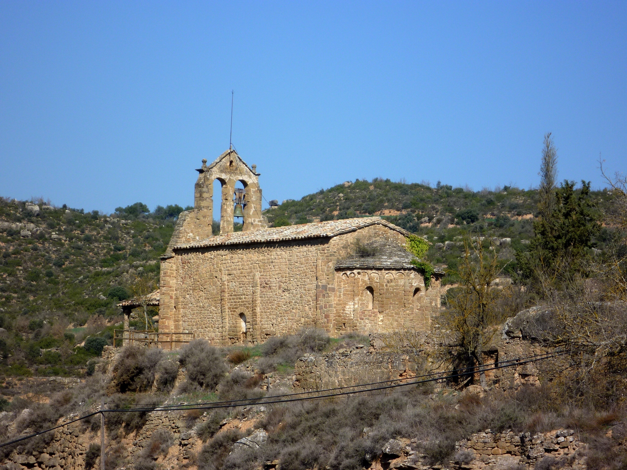 Sant Miquel de Fontanet (Torà)